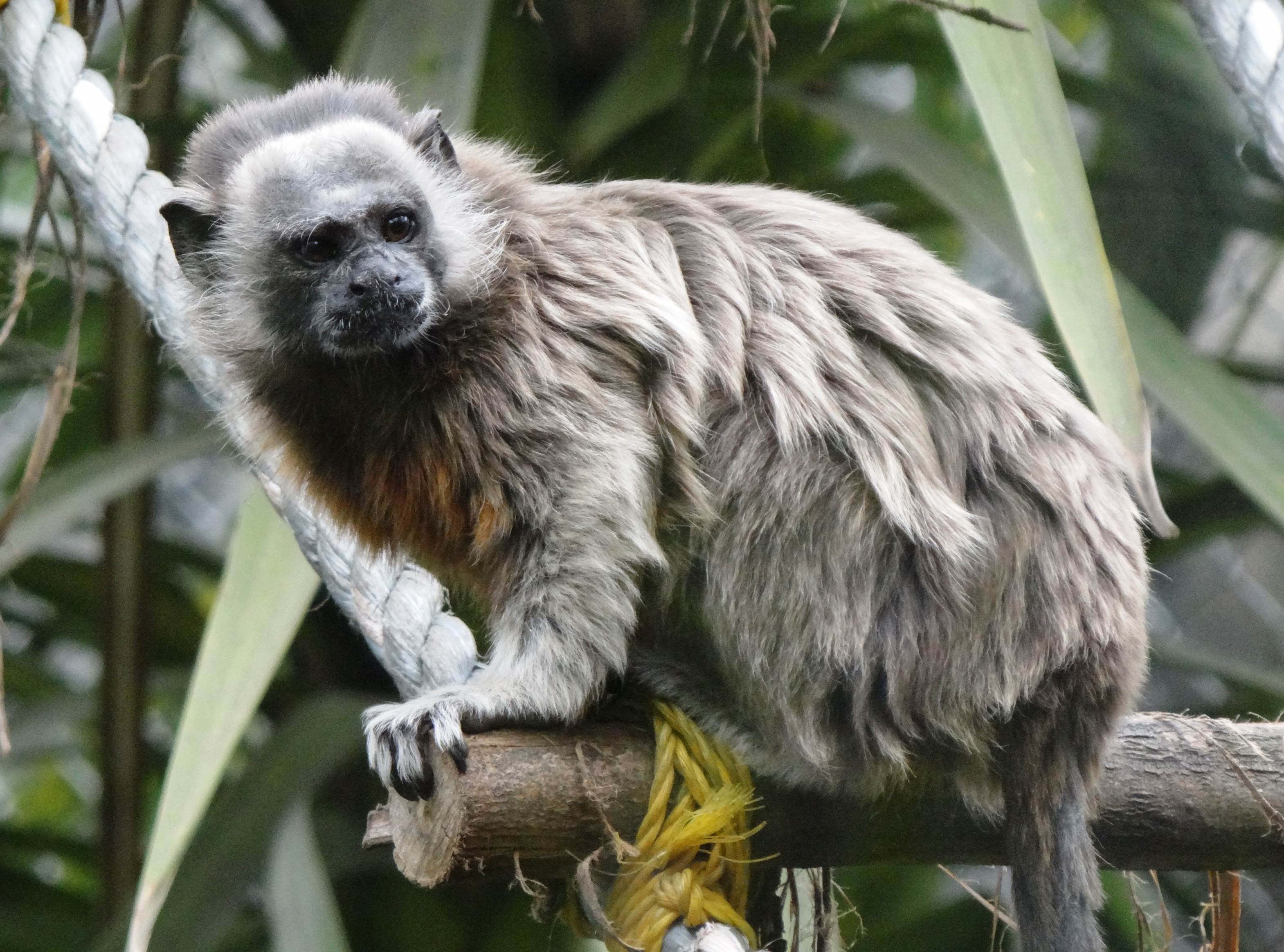 Saguinus leucopus (tamarino de patas blancas) en el zoológico del parque Jaime Duque, Cundinamarca, Colombia